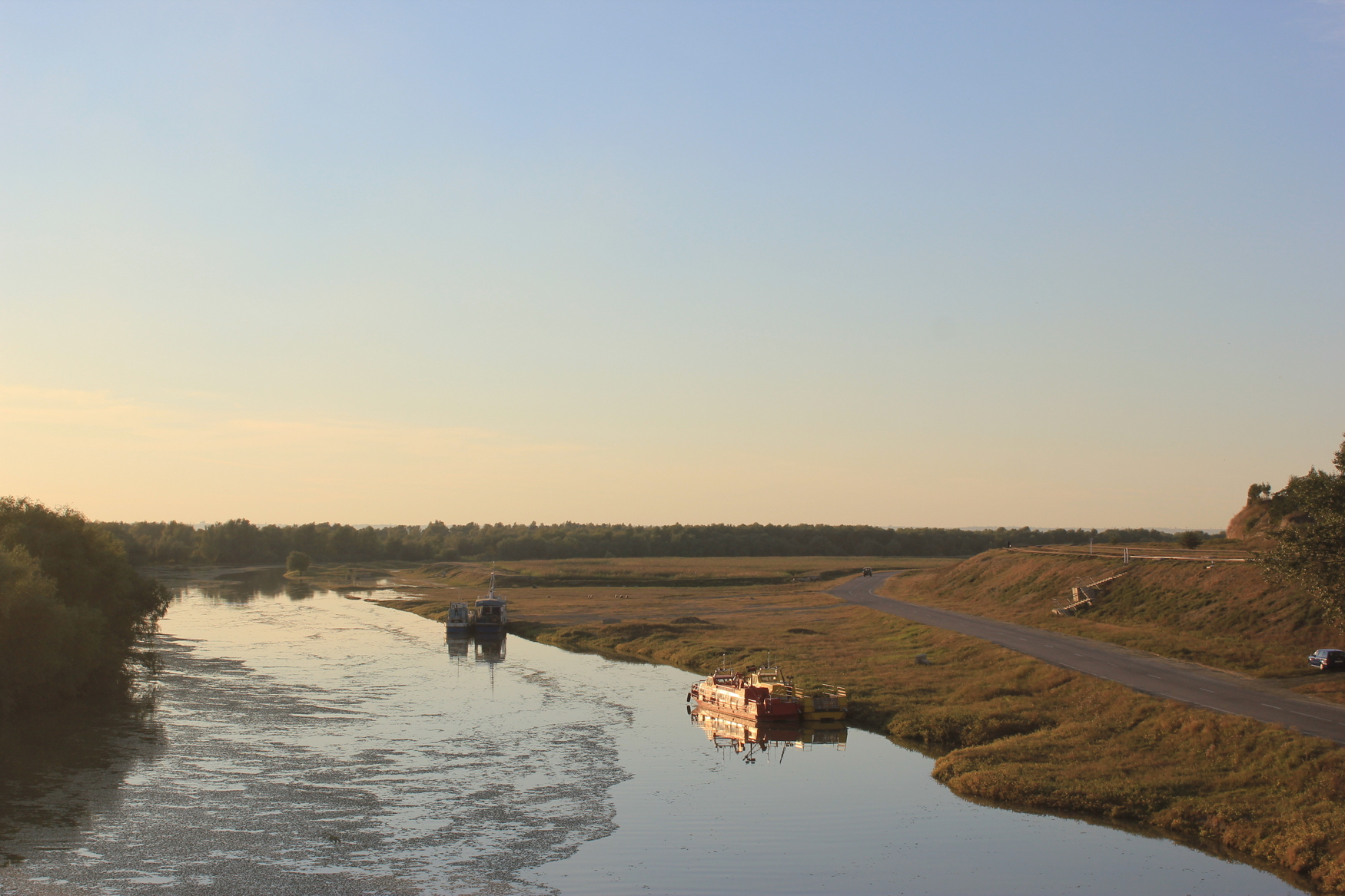 Der Pruth als Grenzfluss zwischen Moldawien (rechts) und Rumänien (links) zwischen Giurgiulești und Galati.